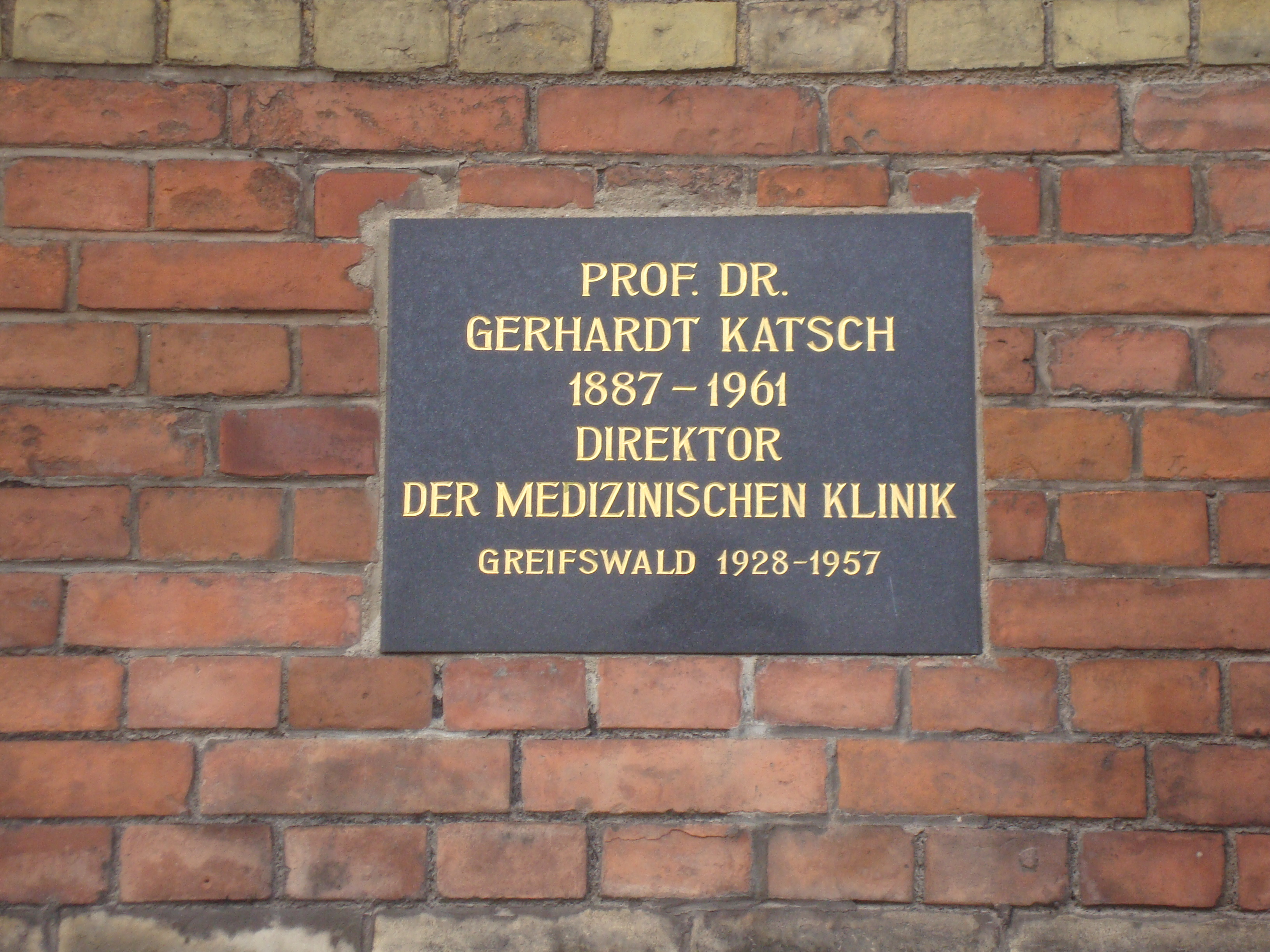 Gedenktafel für Gerhardt Katsch an der alten Universitätsklinik in der Friedrich-Loeffler-Straße 23 in Greifswald.